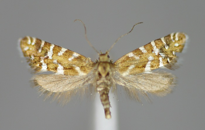 Glyphipterix bergstraesserella